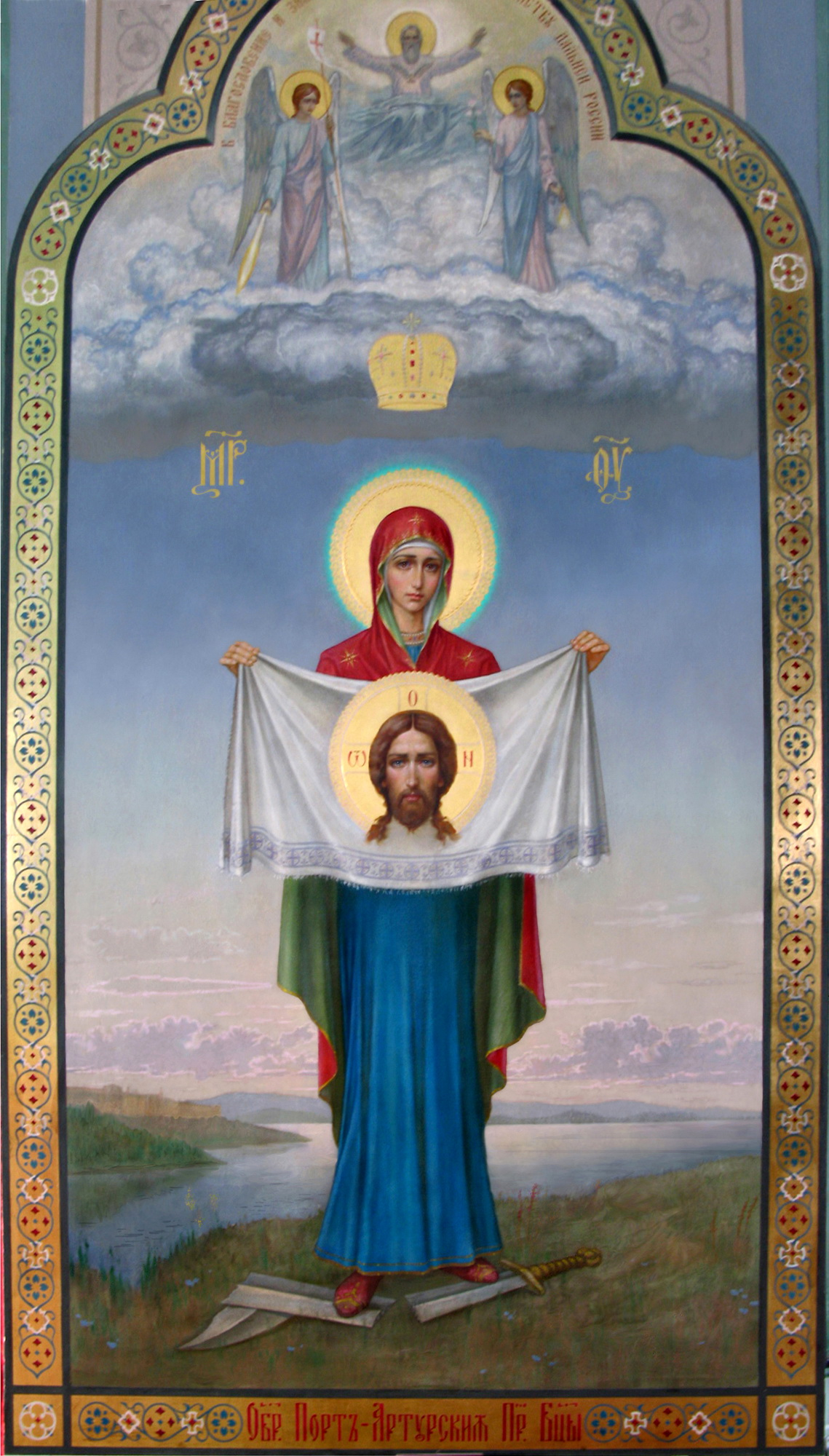 Порт-Артурская икона Божией Матери «Торжество Пресвятой Богородицы» ;материал:холст,клееный на стену,масляные краски,сусальное золото,поталь;приблизительный размер-380см-220см. Церковь Казанской иконы Божьей Матери, г.Харьков, р-он Лысая Гора.